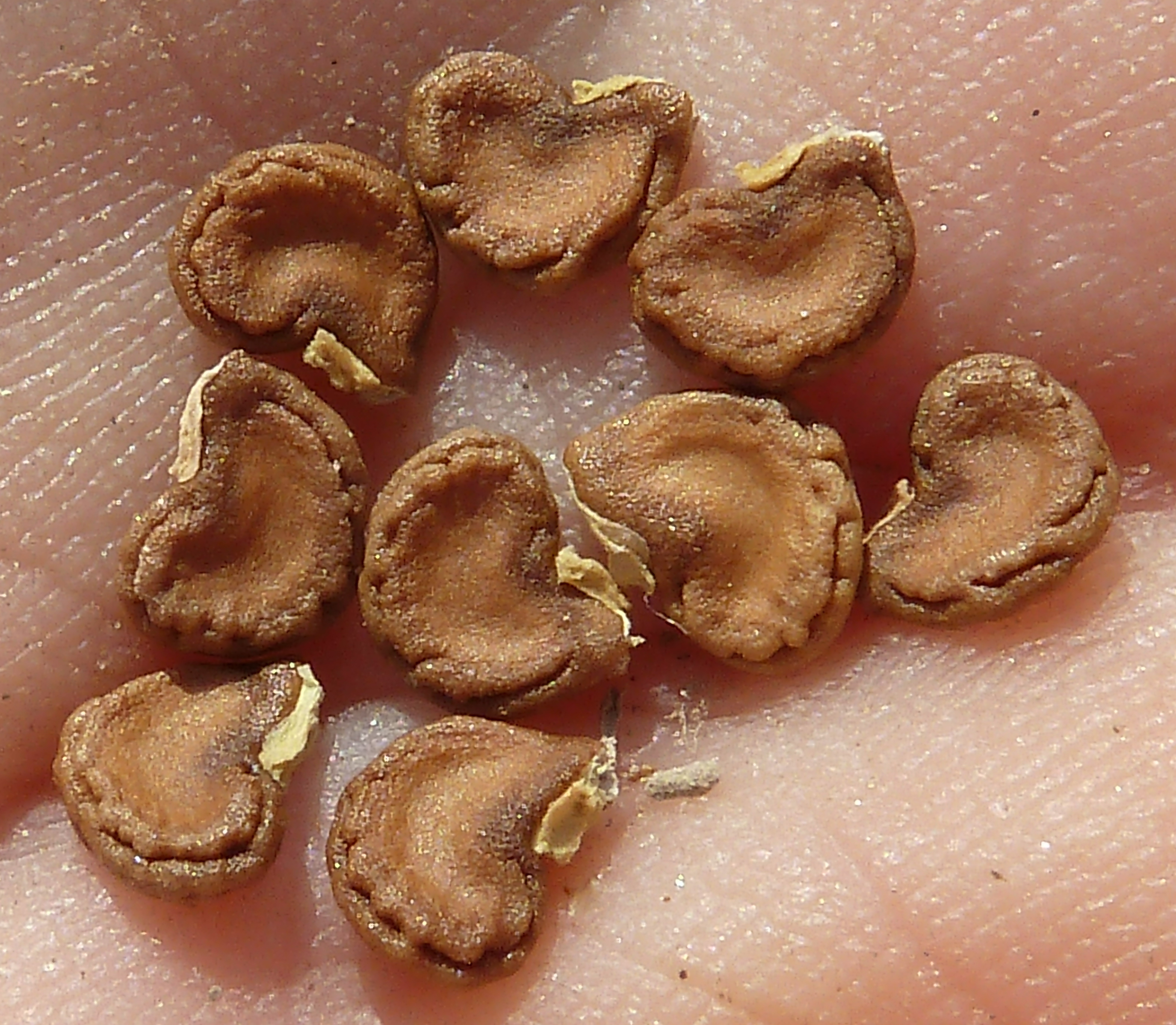 Datura innoxia : semillas - Rambla del Charco, Águilas (Murcia, España).